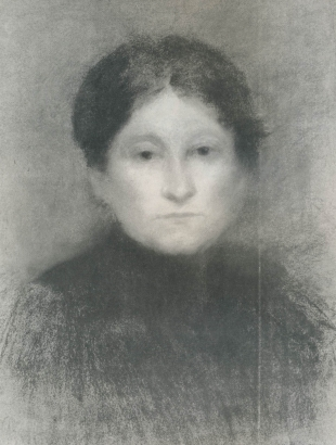 Helena Emingerová - vlastní podobiza